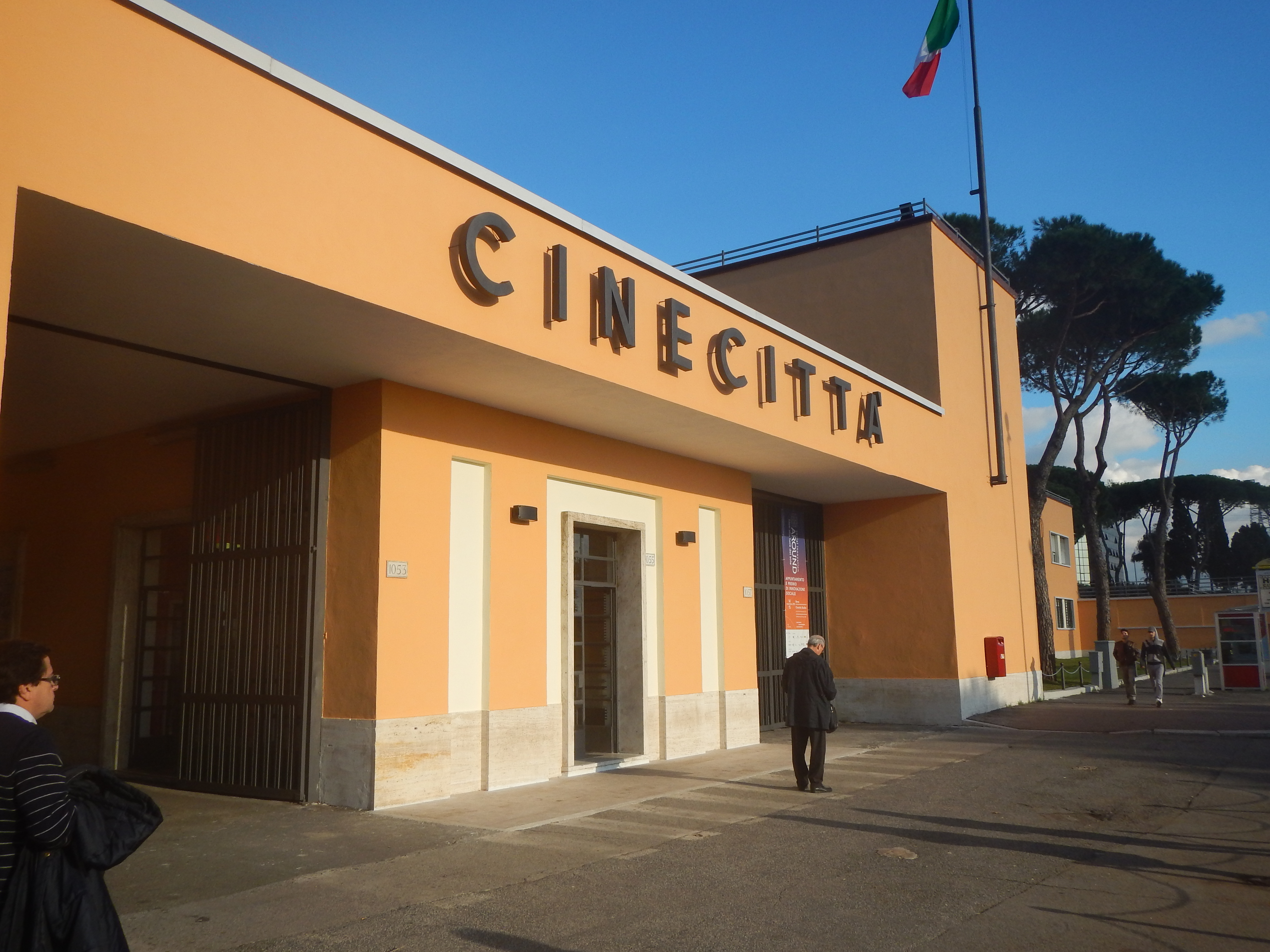 Roma